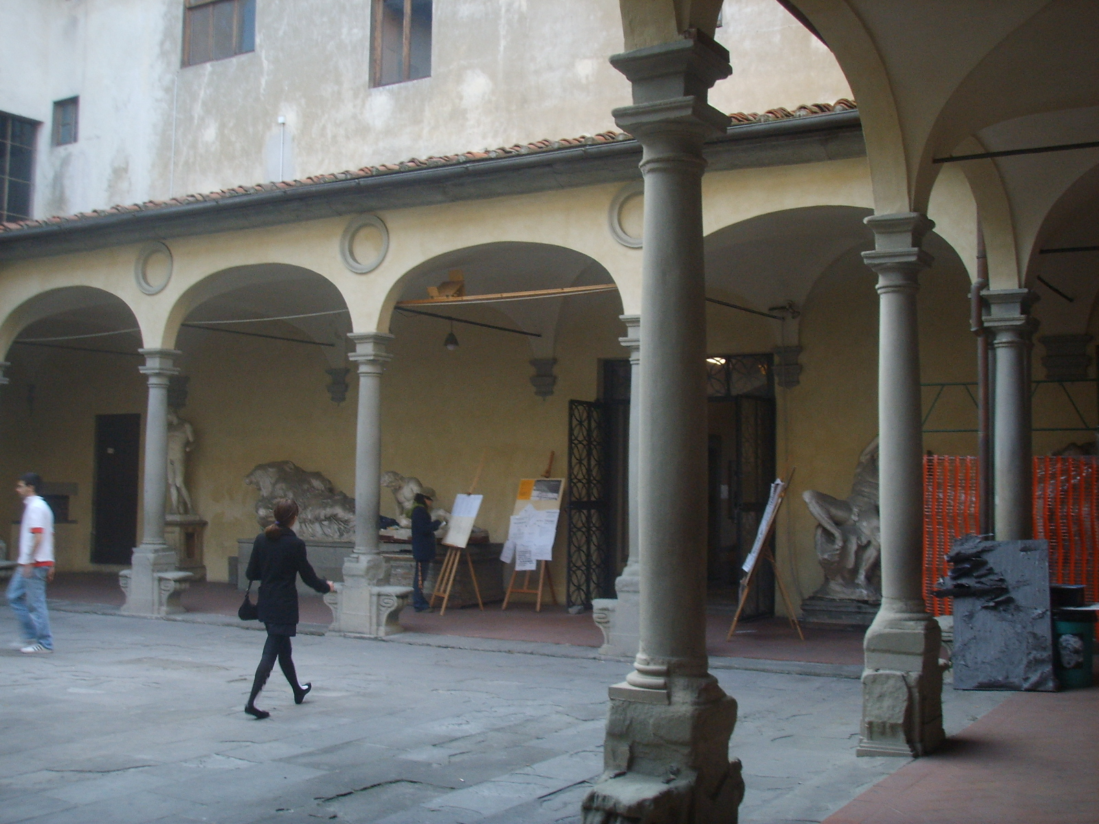 Accademia_di_Belle_arti courtyard in Florence, Italy